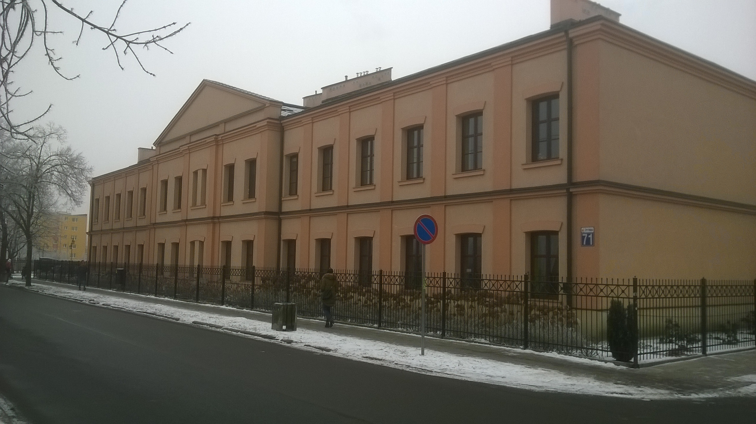 Obecny wygląd (styczeń 2017) budynku sztabowego - jednego z niewielu pozostałych obiektów na terenie przedwojennych koszar pułku przy ulicy Żytniej.